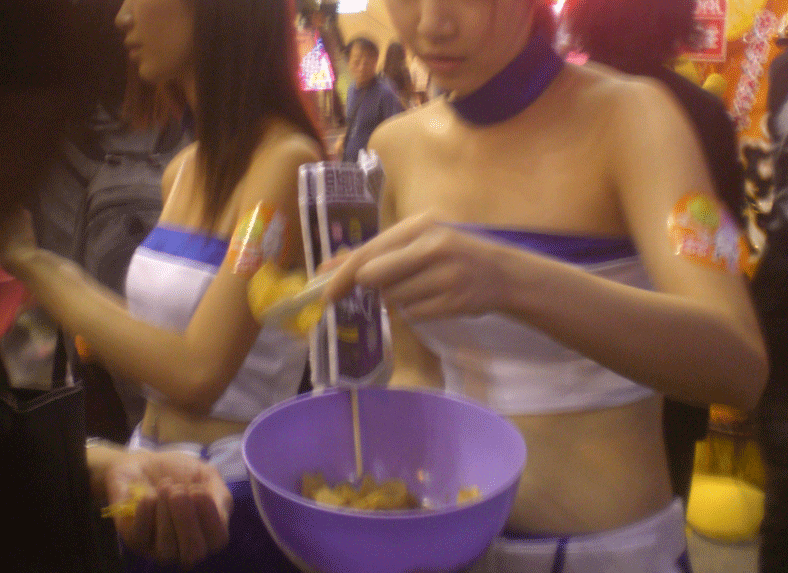 中文（香港）: 珍珍薯片試食 少女模特兒